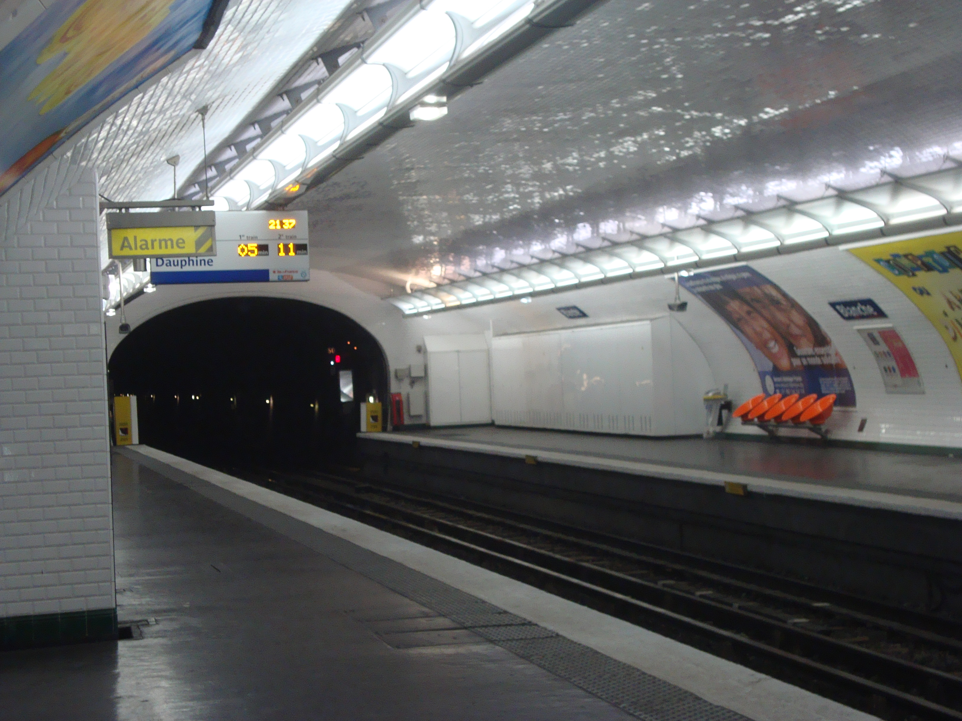 Quais du métro Blanche sur la ligne 2 du métro de Paris